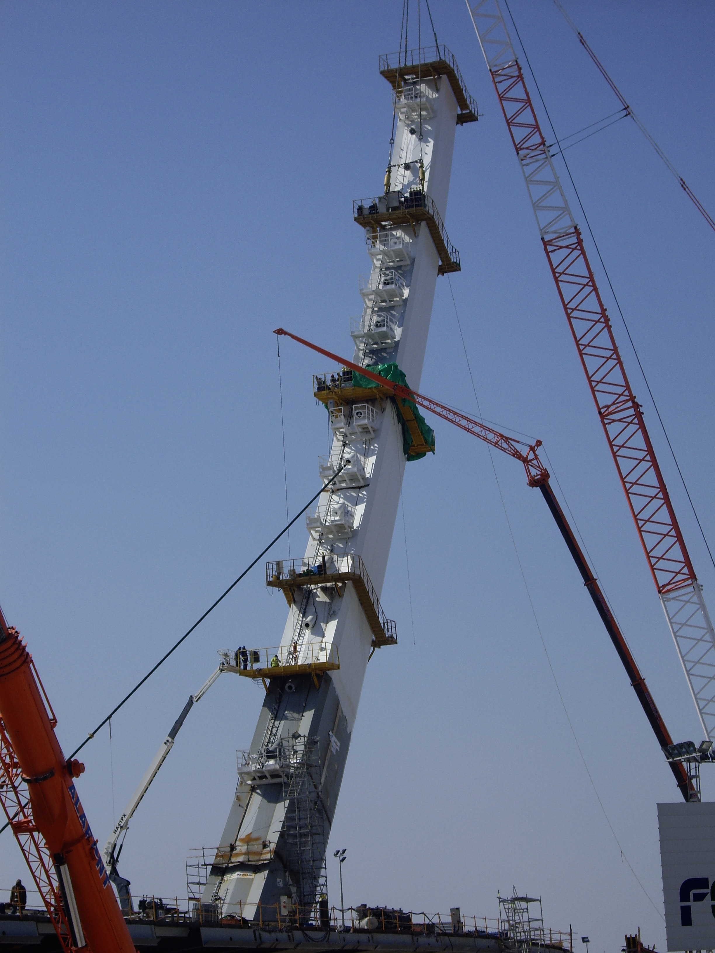 Imagen del puente de l'Assut de l'Or en construcción